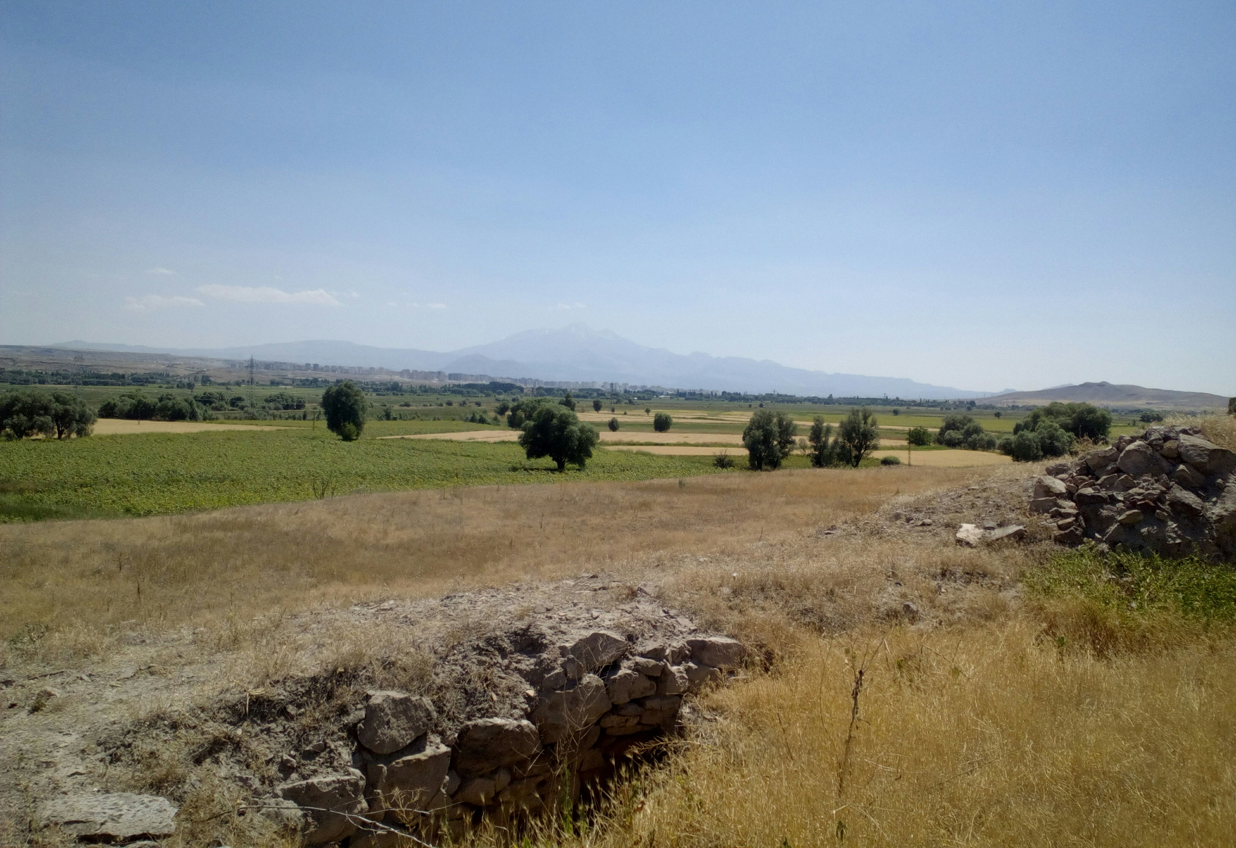 Az Erciyes Kültepéből, Anittasz tornya mögül (Kültepe, Kayseri, Törökország)